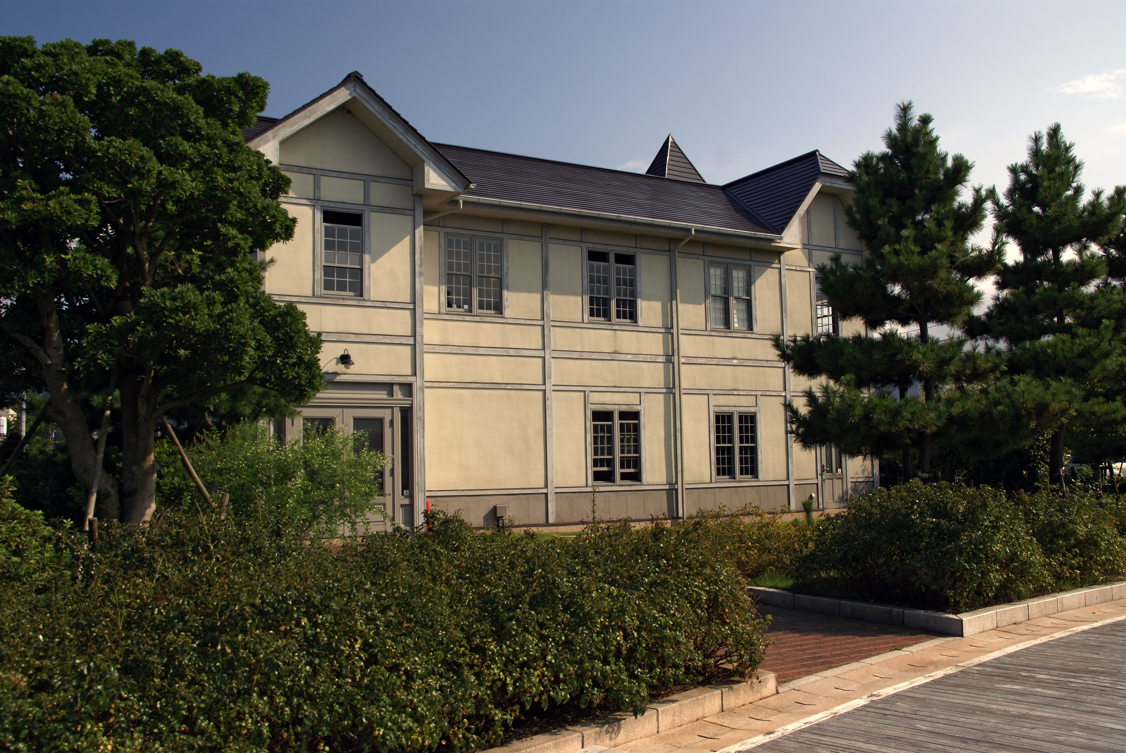 Old Tsuruga-port Station in Tsuruga, Fukui prefecture, Japan